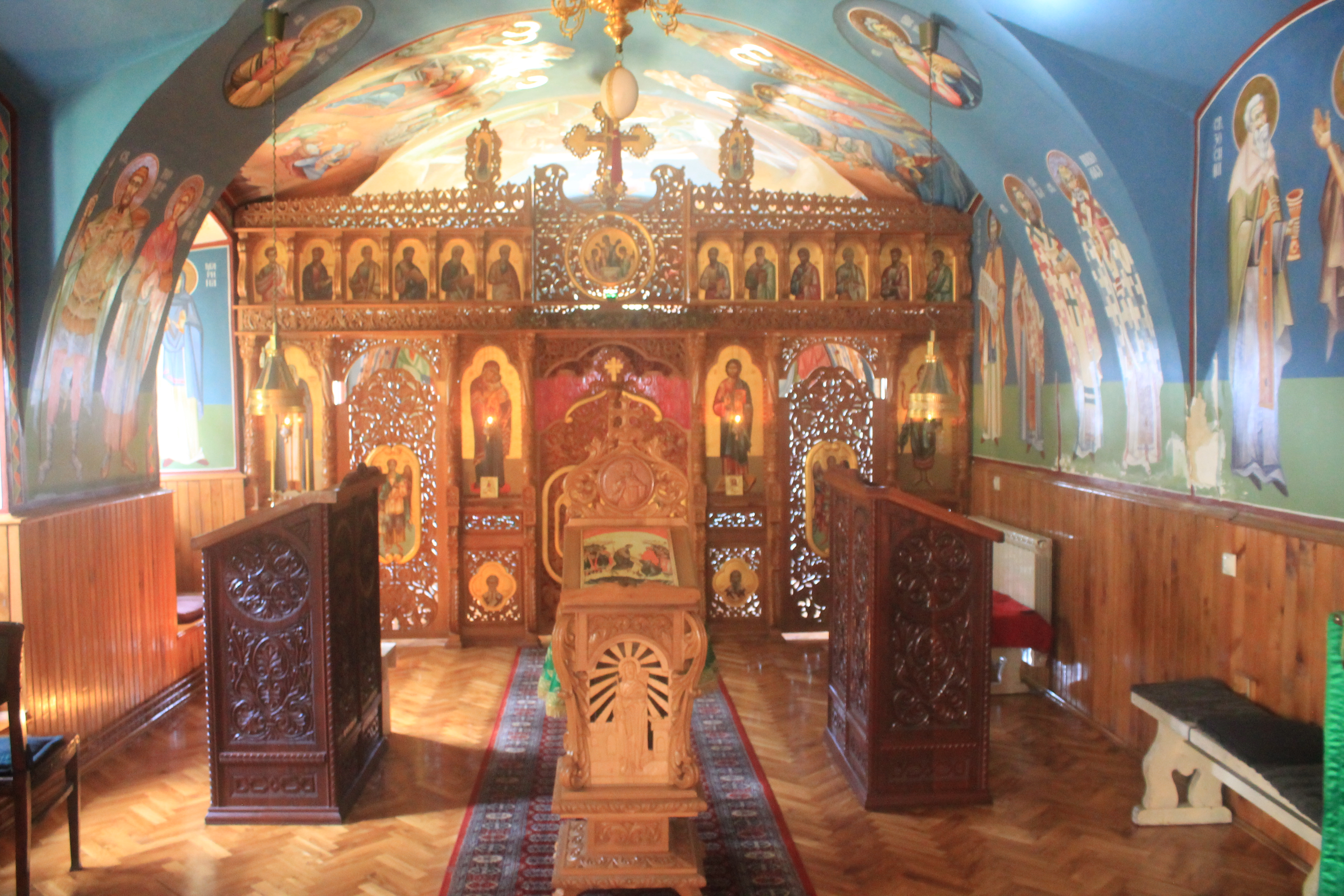 Manastir Grgeteg, april 2018.